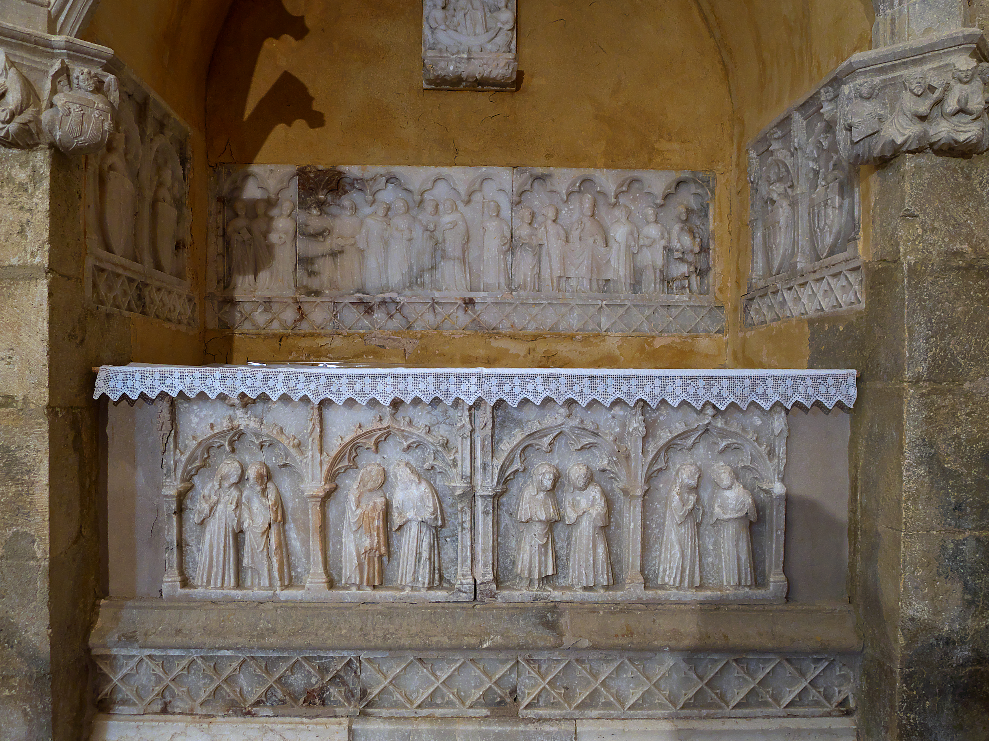 Por menor del sepulcro de Gonzalo de Funes (†1420), Comendador de la Orden de San Juan de Jerusalen (1392) y Castellán de Amposta (1417-1420). Sepulcro de alabastro atribuido a taller de Pere Moragues.